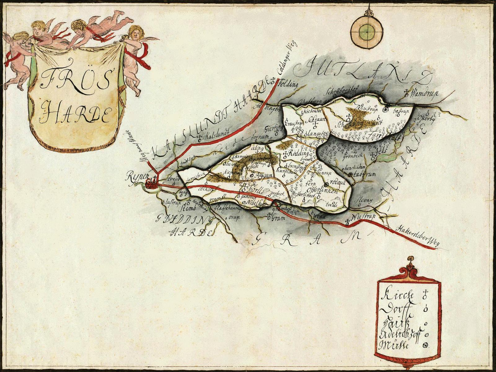 Frös Harde